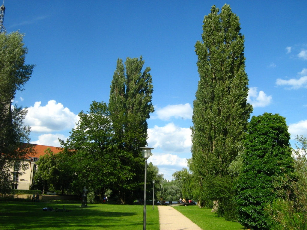 Pyramidenpappeln Populus nigra 'Plantierensis' auf der Freundschaftsinsel. Die Freundschaftsinsel ist eine Havelinsel in Potsdam.